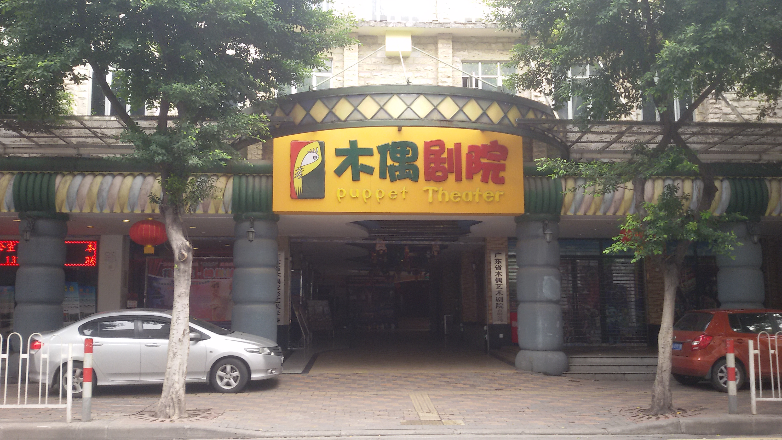 粵語: 廣東省木偶藝術劇院